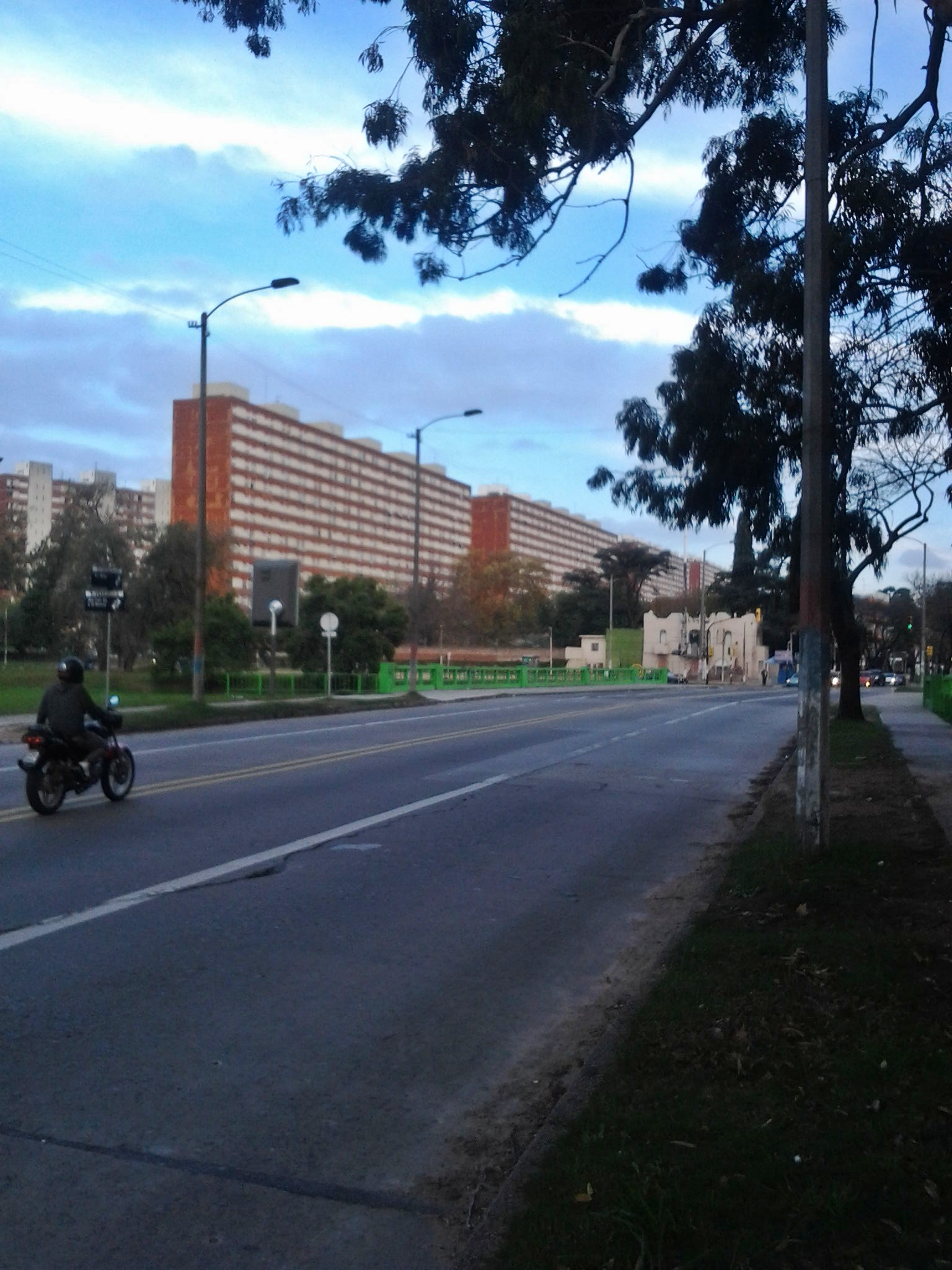 Vista Parcial del Parque Posadas desde el puente de Avenida Millán sobre el arroyo Miguelete